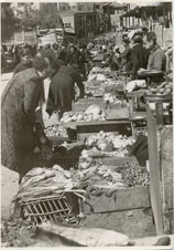 מוכרי ירקות בשוק תלפיות